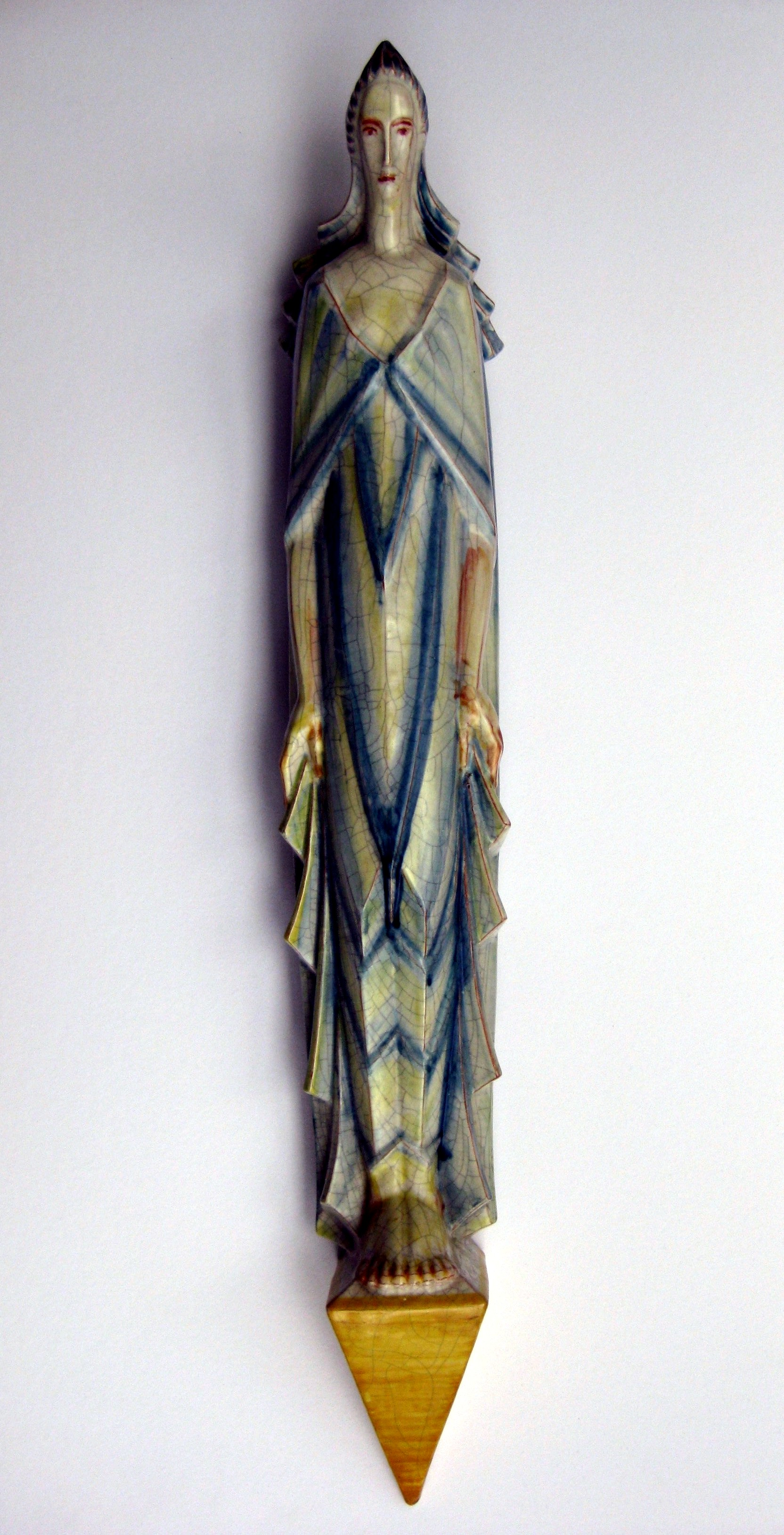 Kieler Kunst-Keramik AG, Wandfigur (Madonna), Entwurf: Ludwig Kunstmann, 1926, Höhe: 90 cm. Norddeutsche Privatsammlung.